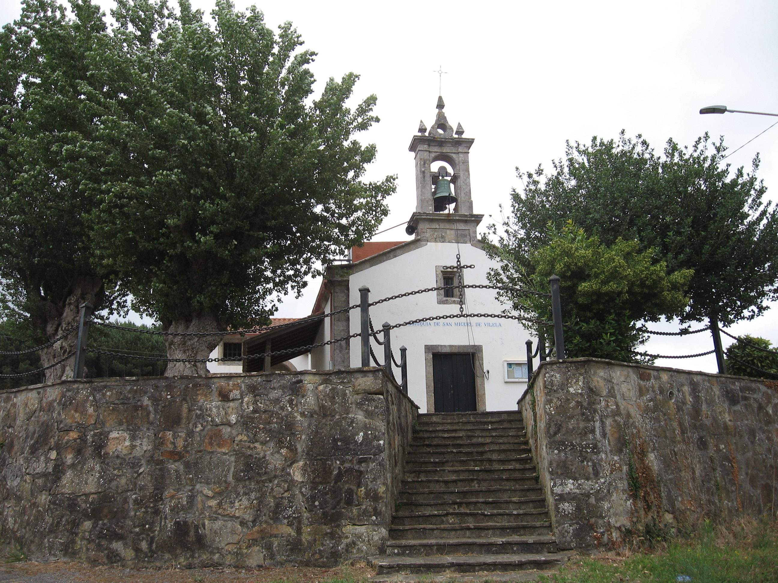 Igrexa Parroquial de Vilela